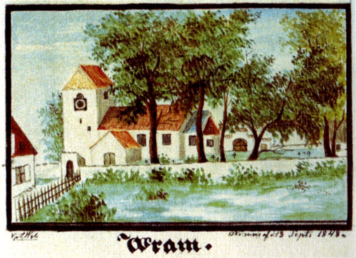 Västra Vrams kyrka på en akvarell från 1848 gjord av C A Wetterbergh. Bilden är inscannad från boken Västra Vrams kyrka - den som fanns och den som finns utgiven 1992, men borde ändå vara public domain.